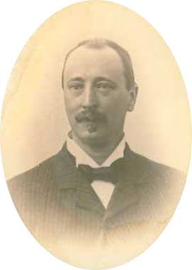 Jan Hendrik Tromp Meesters (1855-1908)